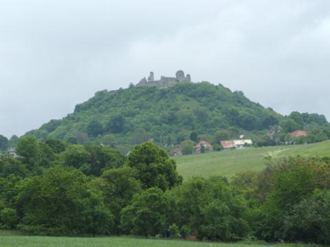 Burg - Berencs - Slovakia - Europe